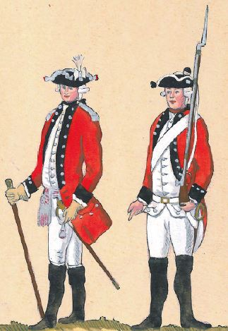 38. Regiment Pieszy Koronny im. Królowej Jadwigi